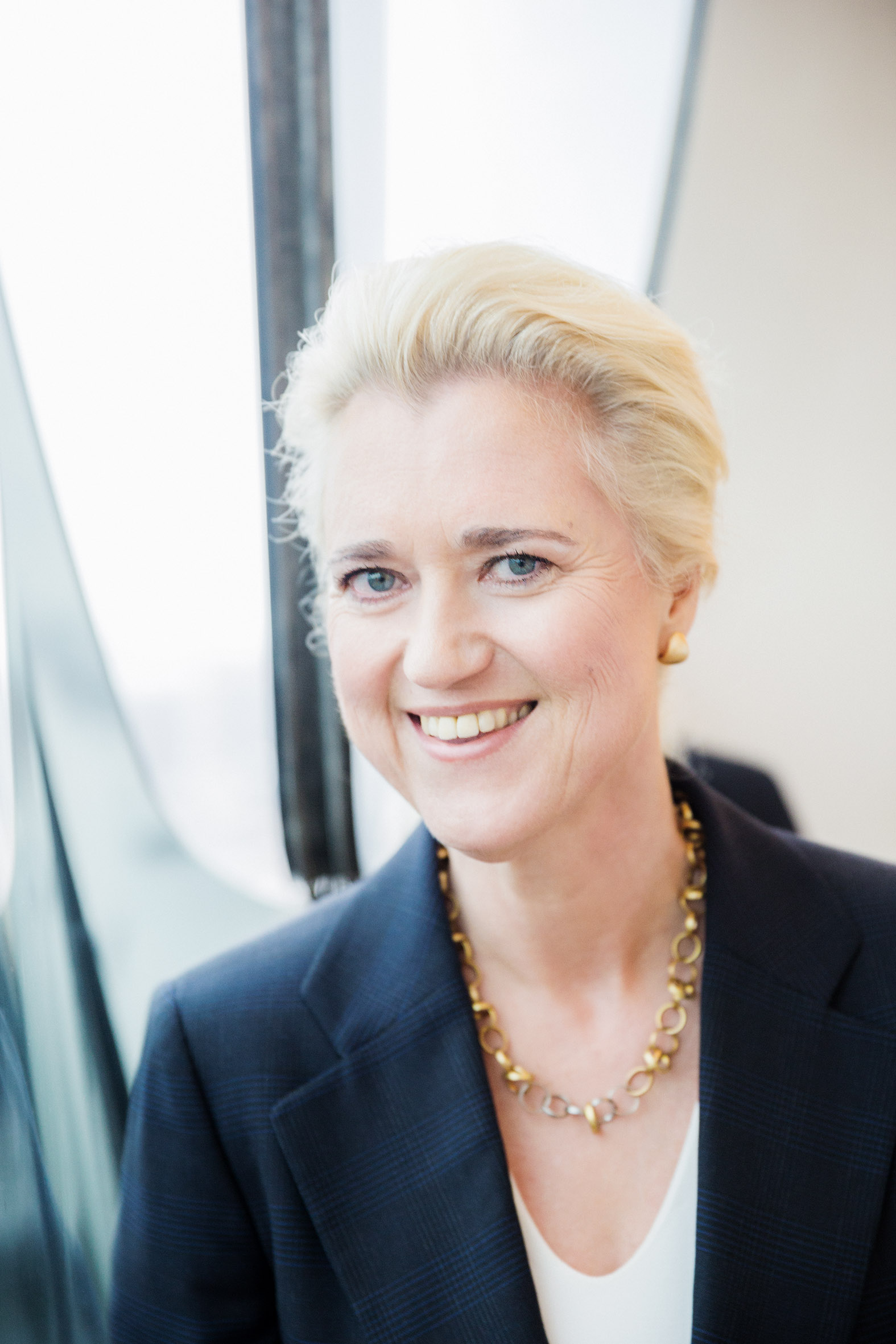 Angela Titzrath, seit 1.1.2017 Vorstandsvorsitzende der Hamburger Hafen und Logistik (HHLA)